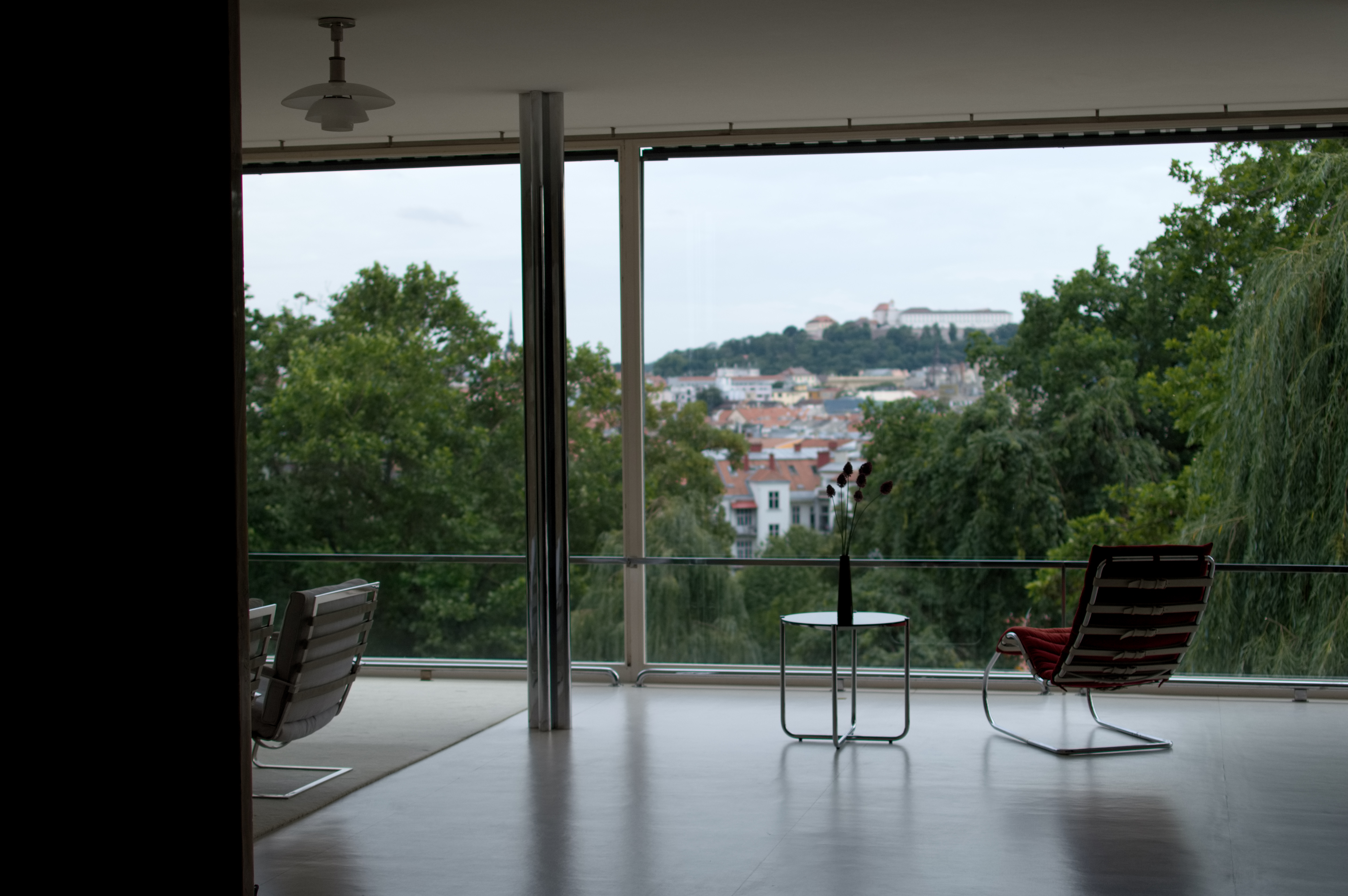 interiér Vila Tugendhat